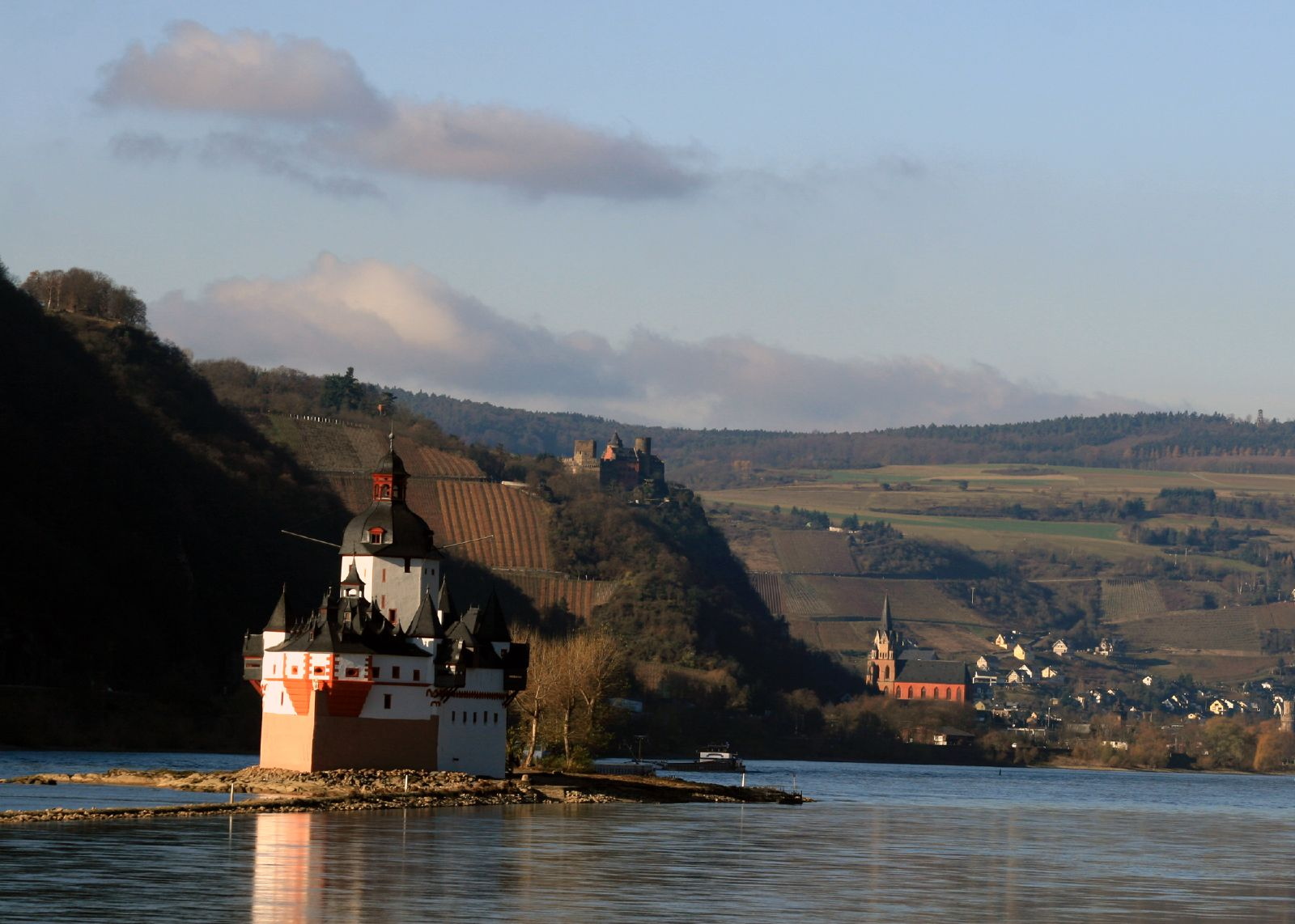 Burg Pfalzgrafenstein mit Oberwesel